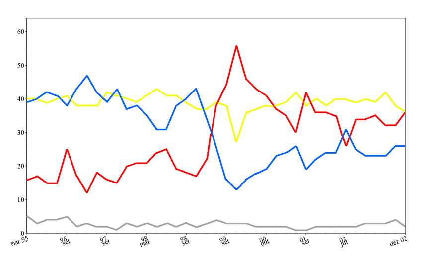 Aprovação da presidência de Fernando Henrique Cardoso entre março de 1995 a dezembro de 2002.